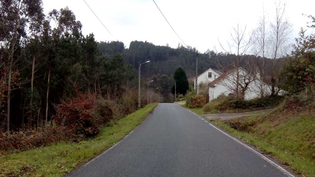 A Cabrita, Doso, Narón.